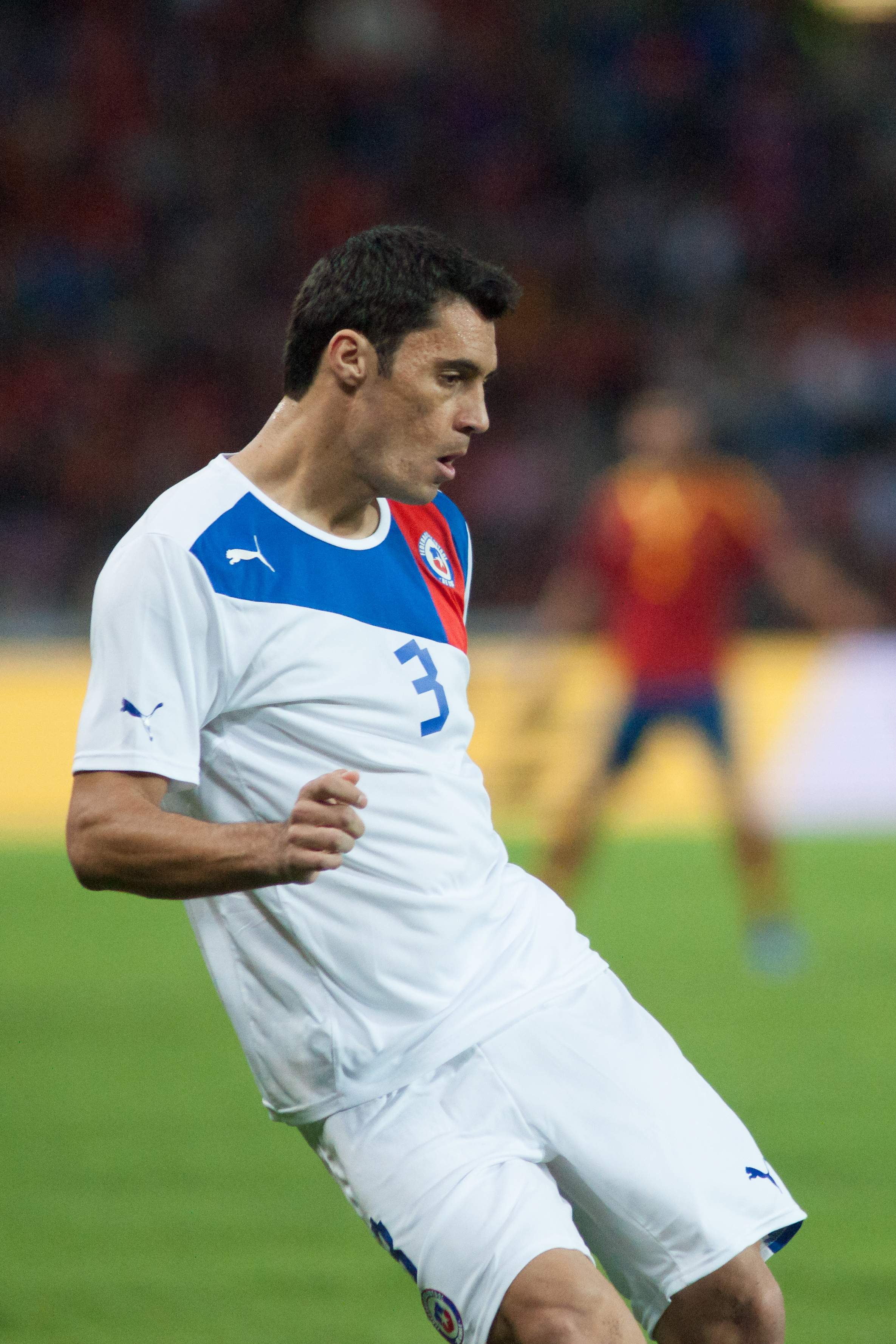 Espagne - Chili, 10 septembre 2013.